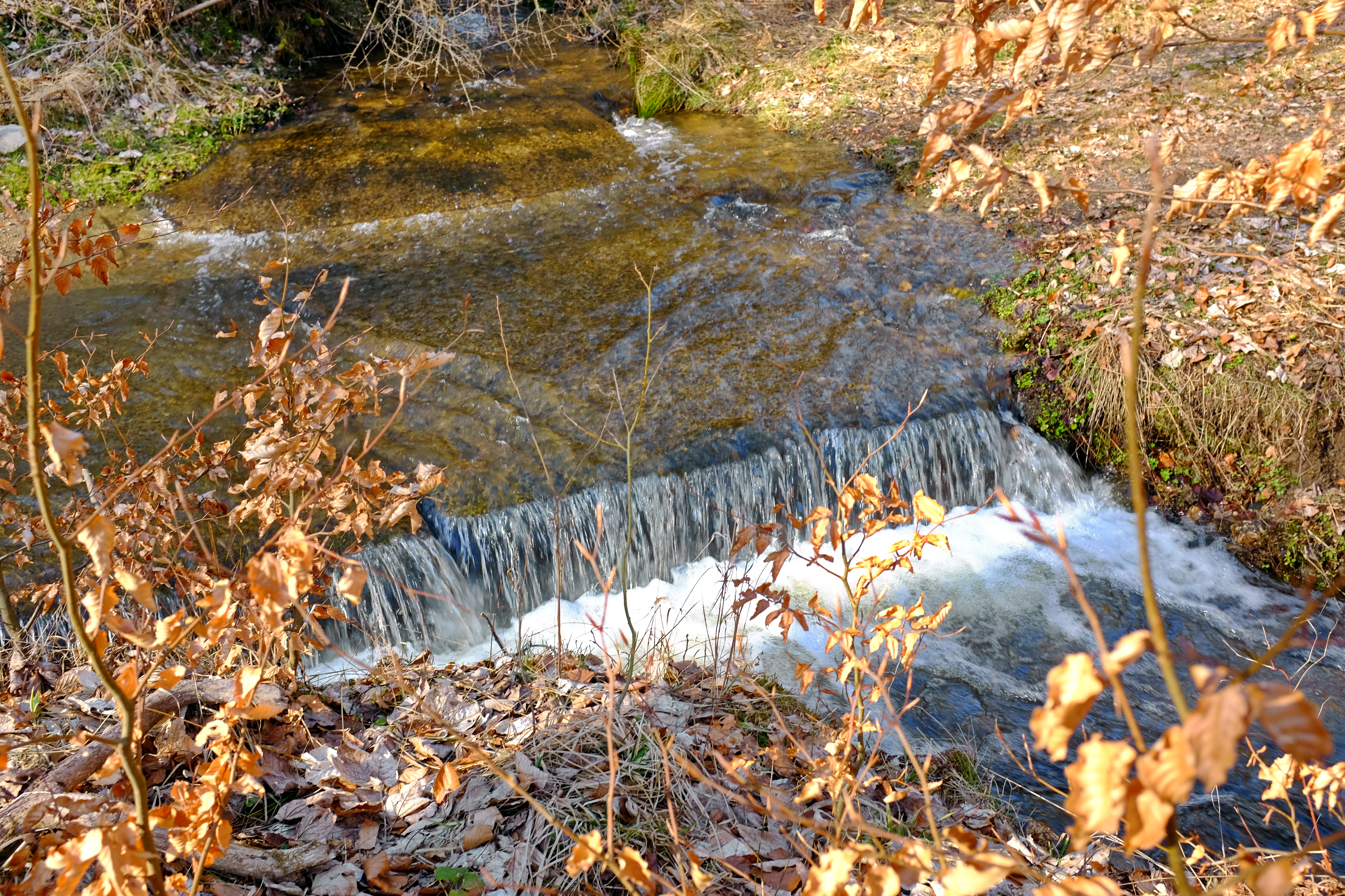 Osvinovský potok pod Horním Hradem, okres Karlovy Vary